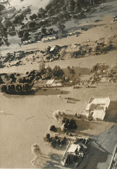 gpinundado